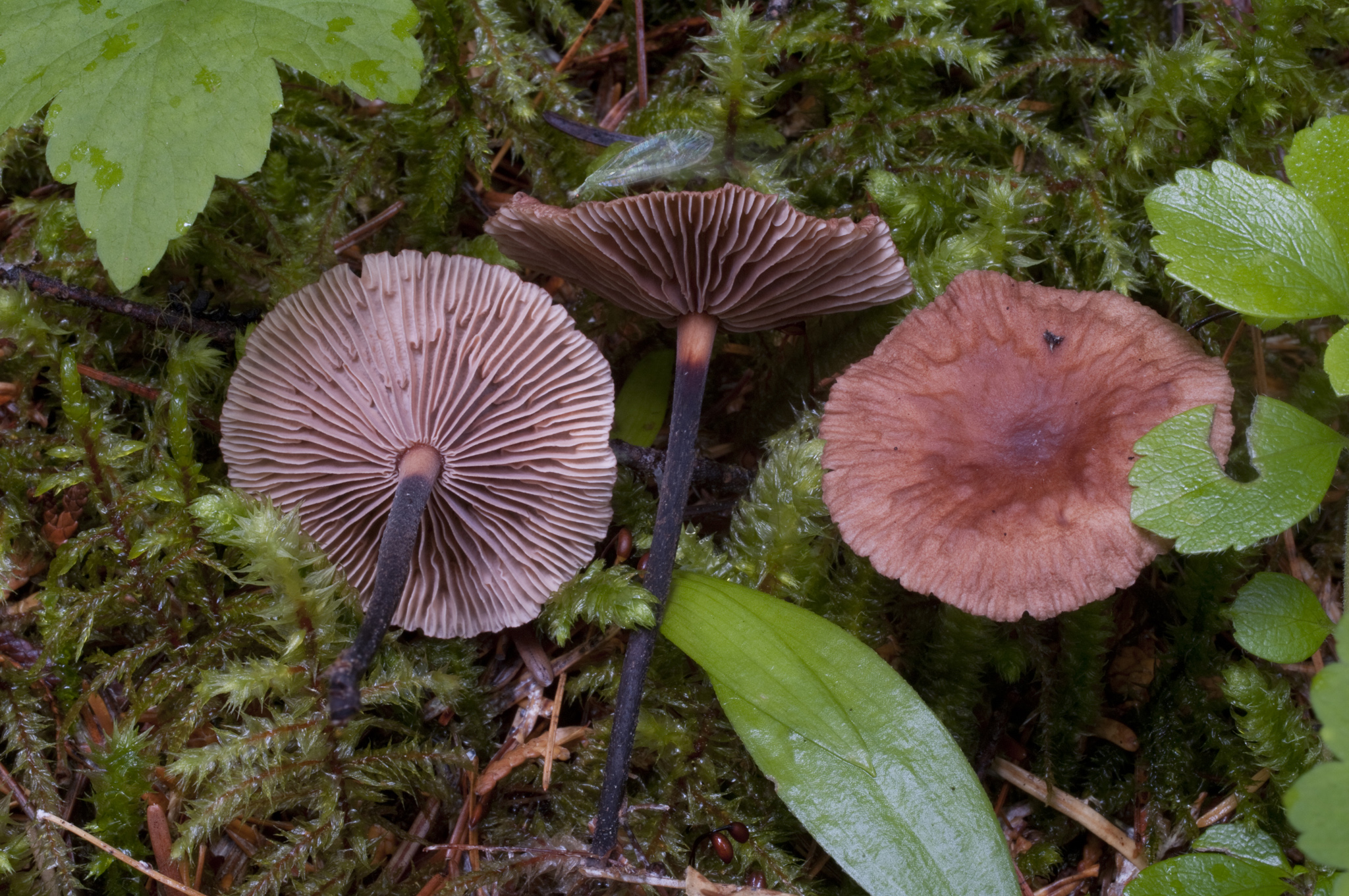 Gymnopus perforans (Hoffm.) Antonín & Noordel.